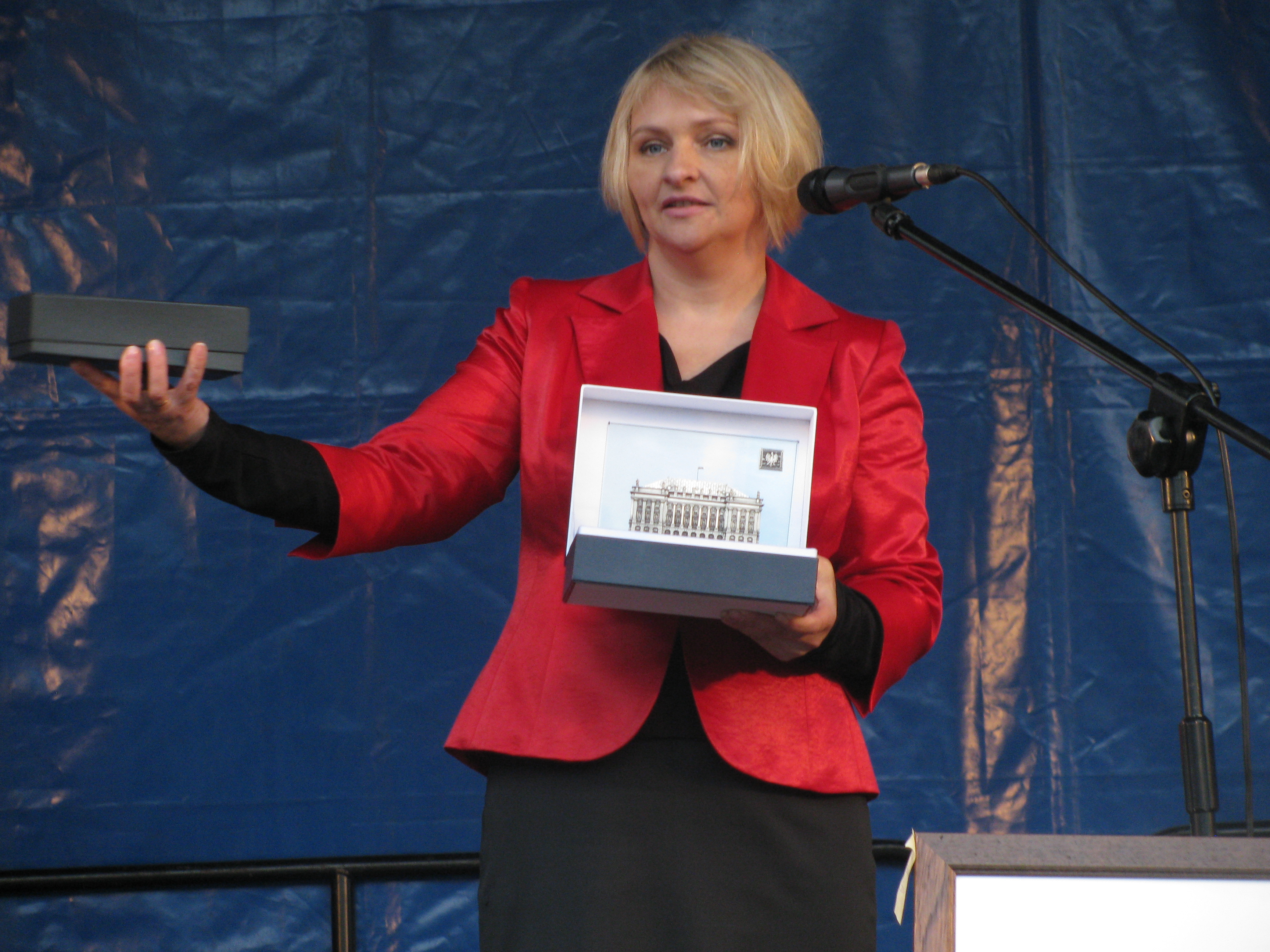 Barbara Bartuś podczas licytacji darów na festynie charytatywnym